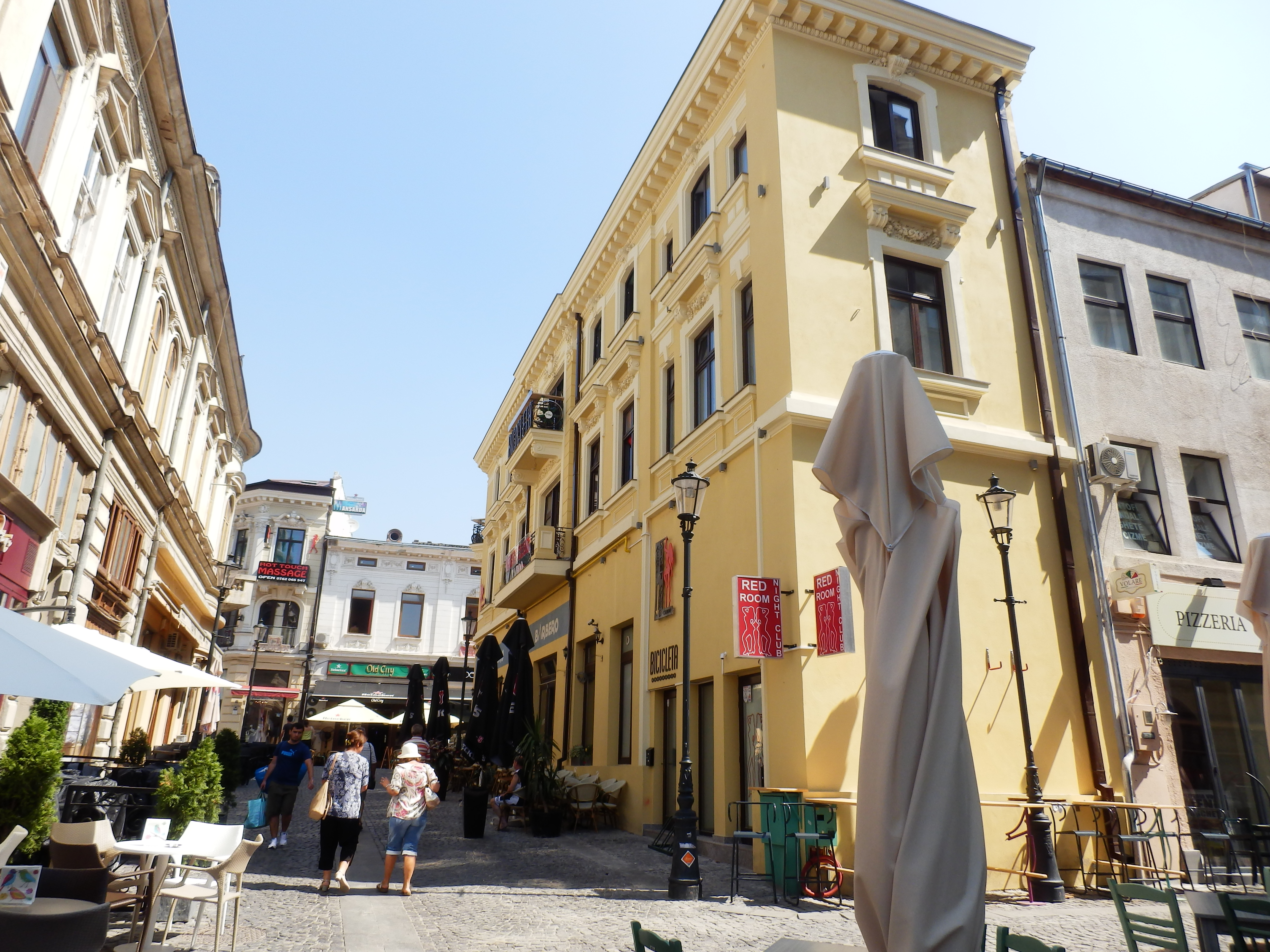 Bucharest, Romania